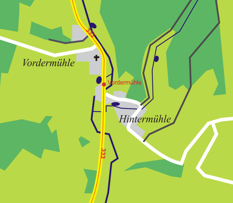 Karte von Benutzer:JensD.